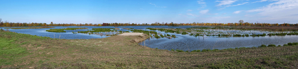 La Francesa Panorama zona umida This is a photo of a monument which is part of cultural heritage of Italy.